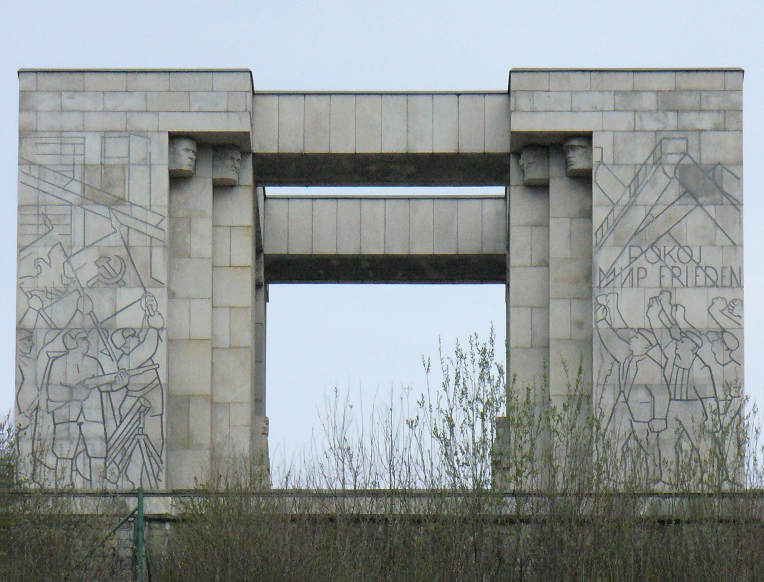 Pomnik Czynu Powstańczego na Górze Świętej Anny (Annaberg)